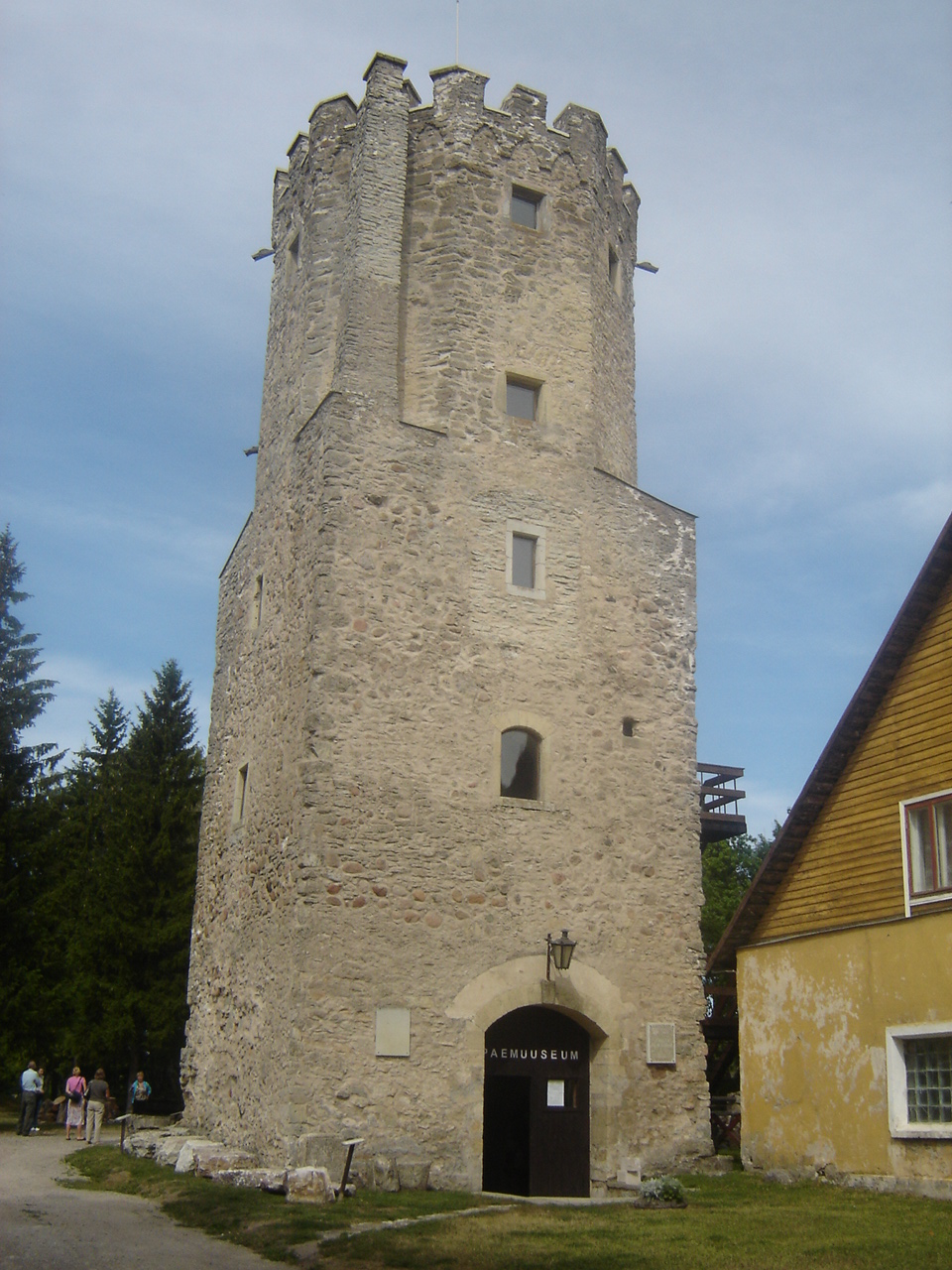 Vaade Porkuni linnuse tornile. Praegu on seal paemuuseum ja tornist avaneb ilus vaade Porkuni järvedele.